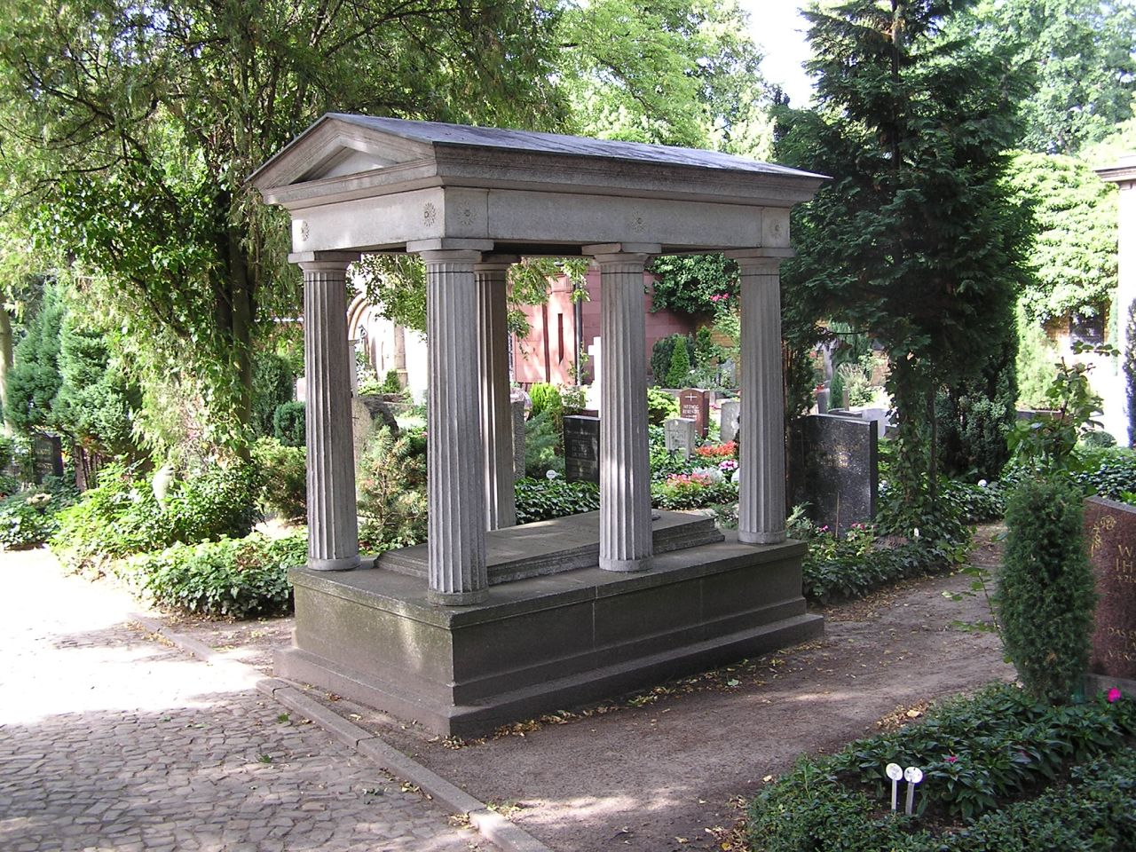 Kirchhof Alt-Schöneberg, Grabmal für Wilhelm Stier, Entwurf von August Stüler